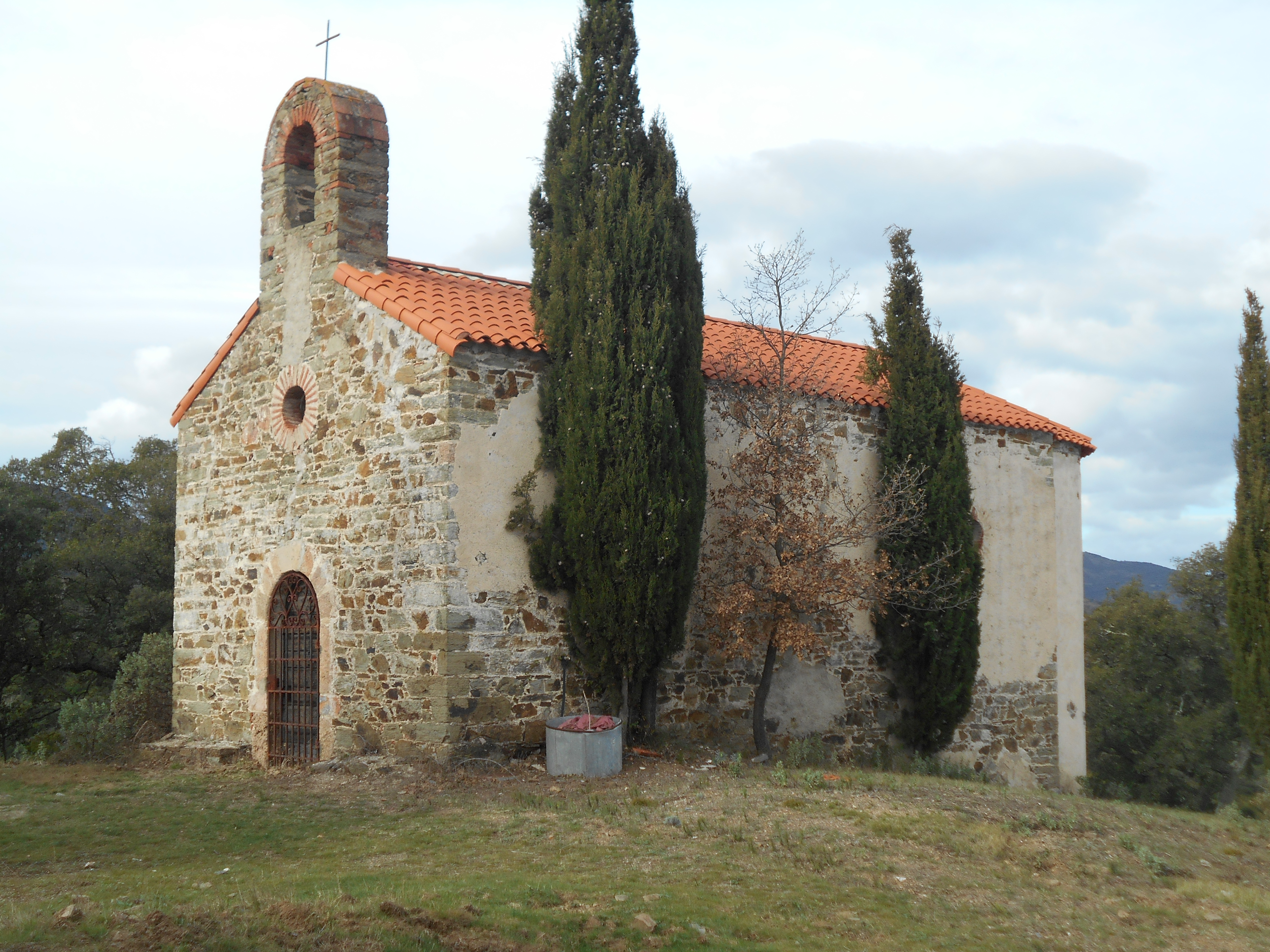 Frontis occidental i façana meridional de Santa Maria de Montoriol